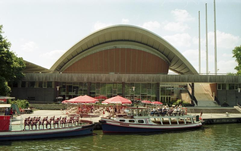 22.7.1991 Berlin, Kongreßhalle - Bezirk Tiergarten